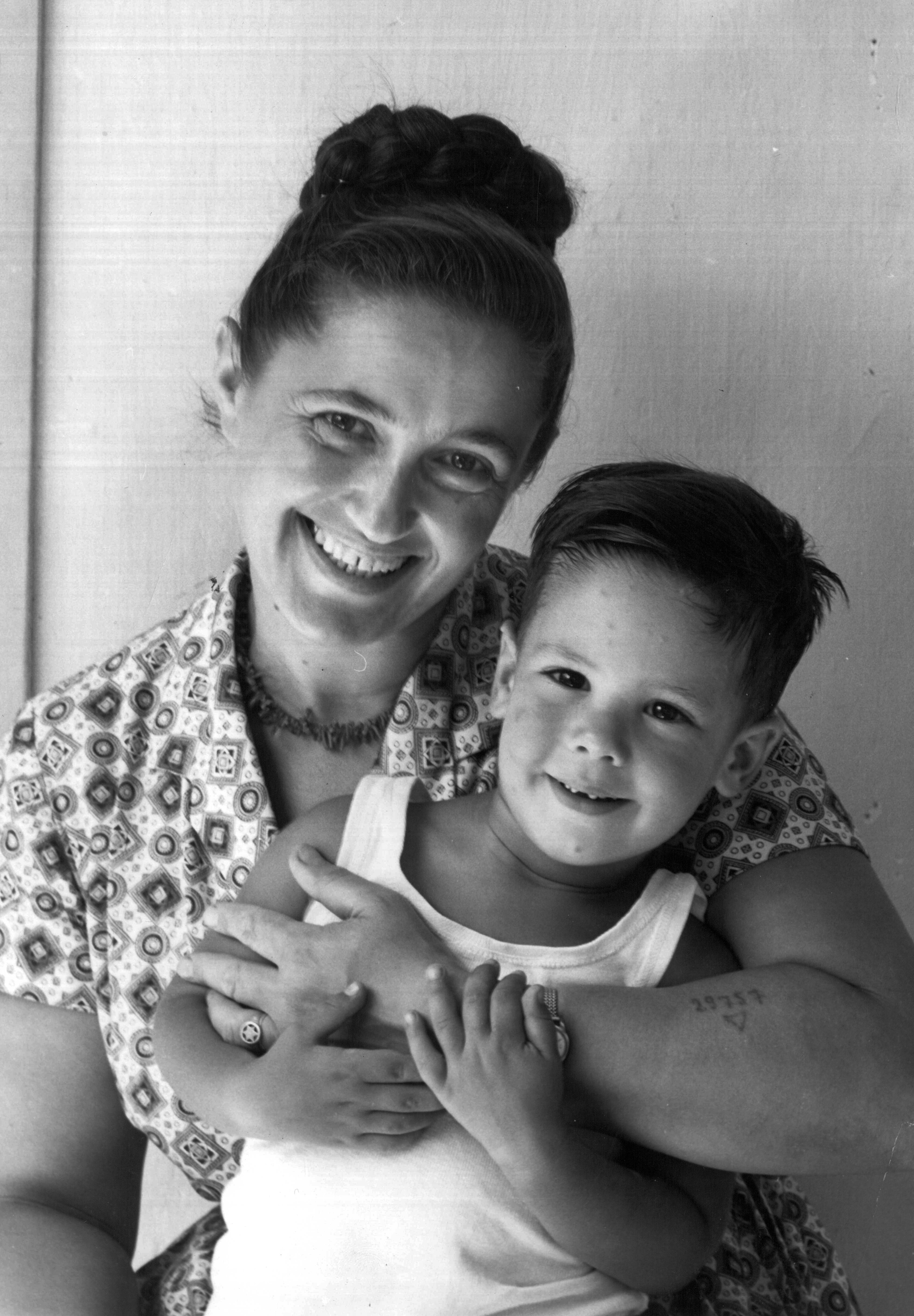 רבקה ויוחי קופר